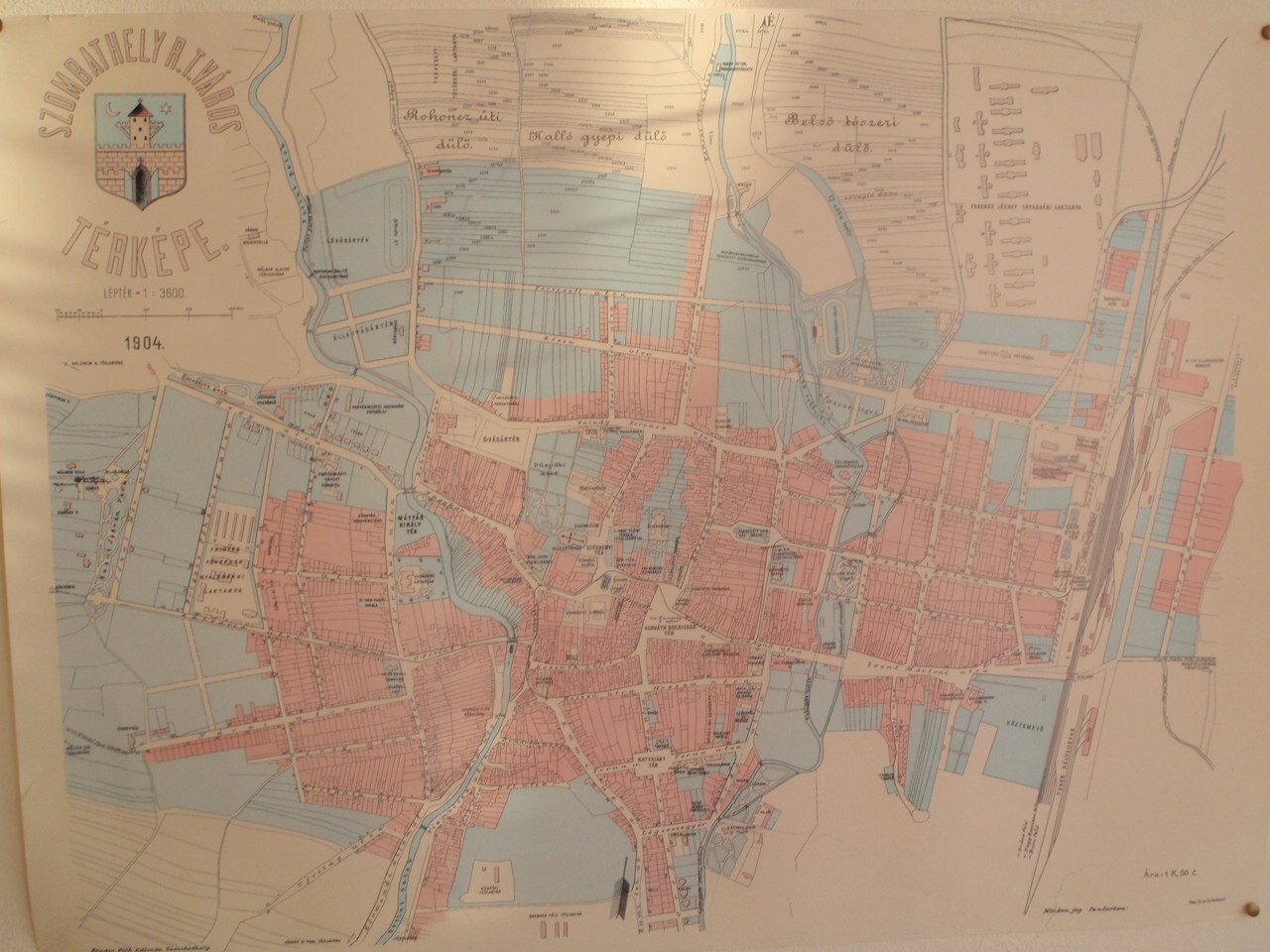 Steinamnager Stadtplan aus 1904.